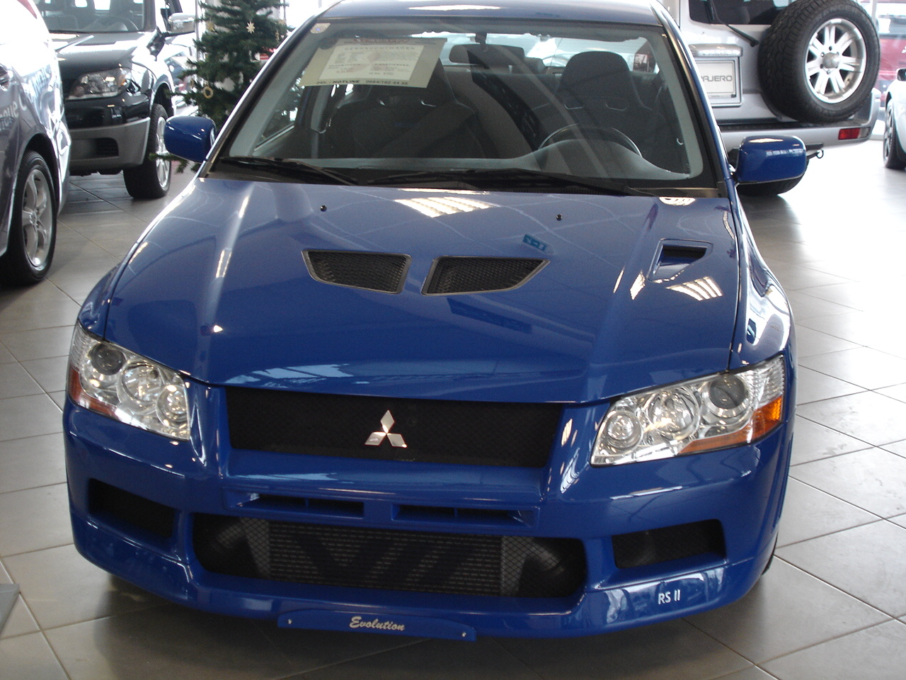 Mitsubishi Lancer Evo VII.jpg